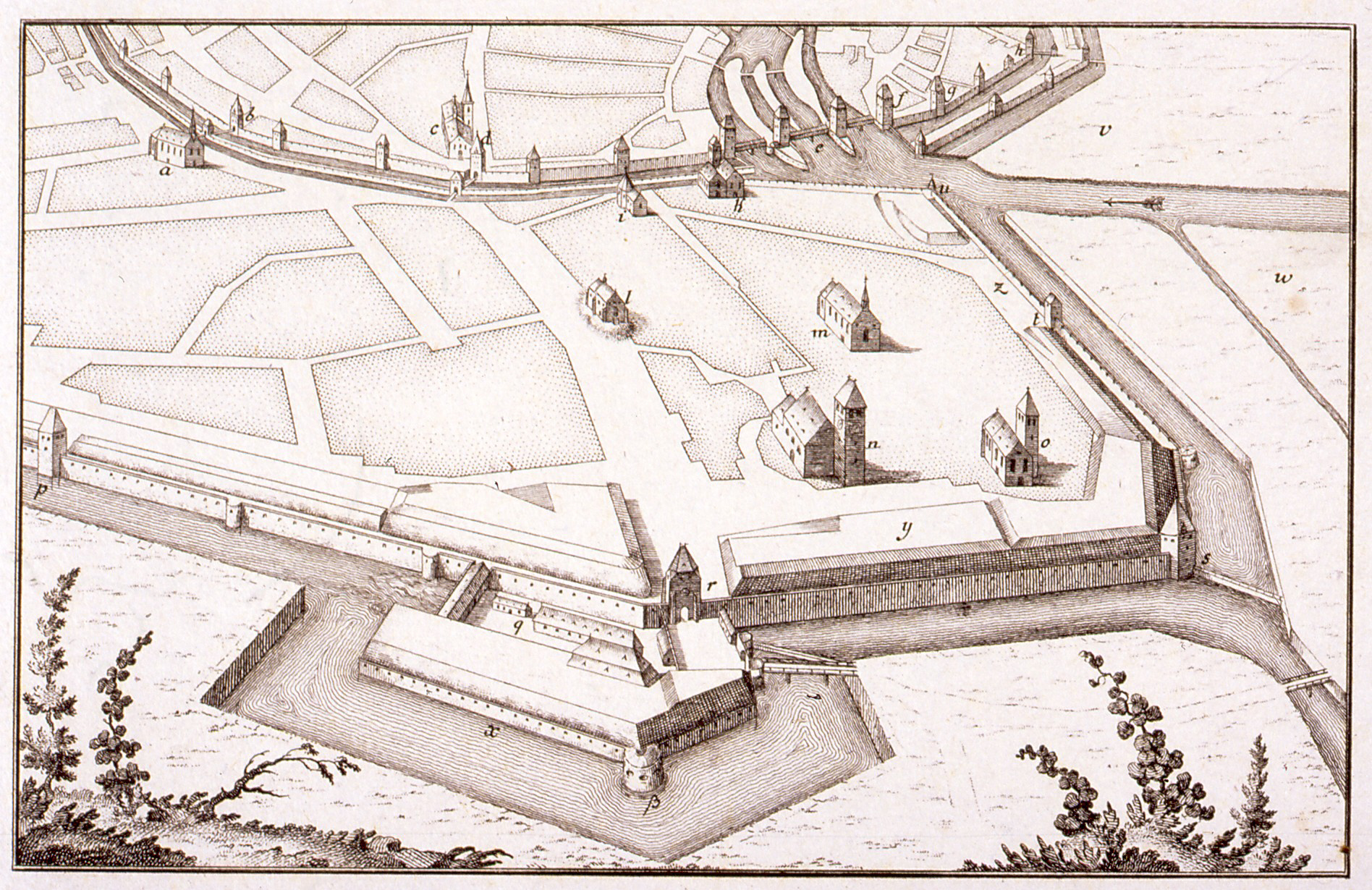 Gravure représentant la porte de la tour Blanche à Strasbourg.